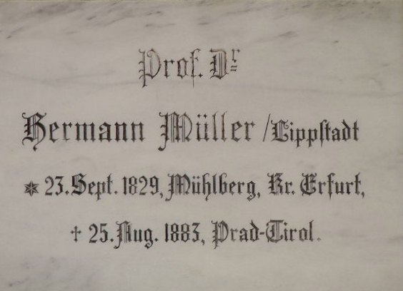 Gedenktafel für Hermann Müller (Lippstadt) In der Nordwand der Kirche St. Johann in Prad am Stilfser Joch